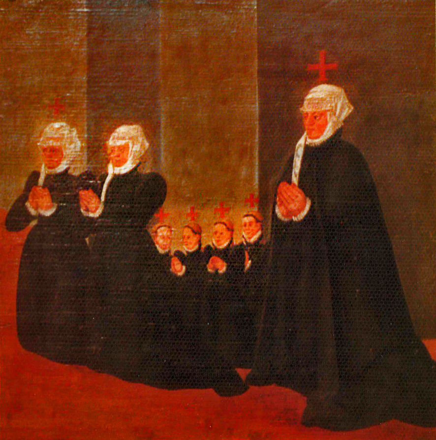 Rechter Flügel (Frauenseite) des Epitaphs der Familie Lemp in der St. Georgkirche in Nördlingen von 1580. Es zeigt u.a. Rebekka Lemp, die 1590 in einem Hexenprozess hingerichtet wurde (zweite von links, ohne Kreuz da 1580 noch lebend).